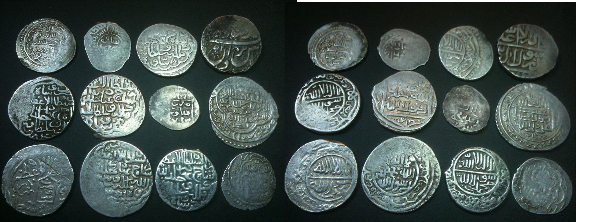 سکه های ضرب ساوه-مجموعه شهرام نگارشی